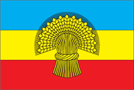 Прапор Оратівського району